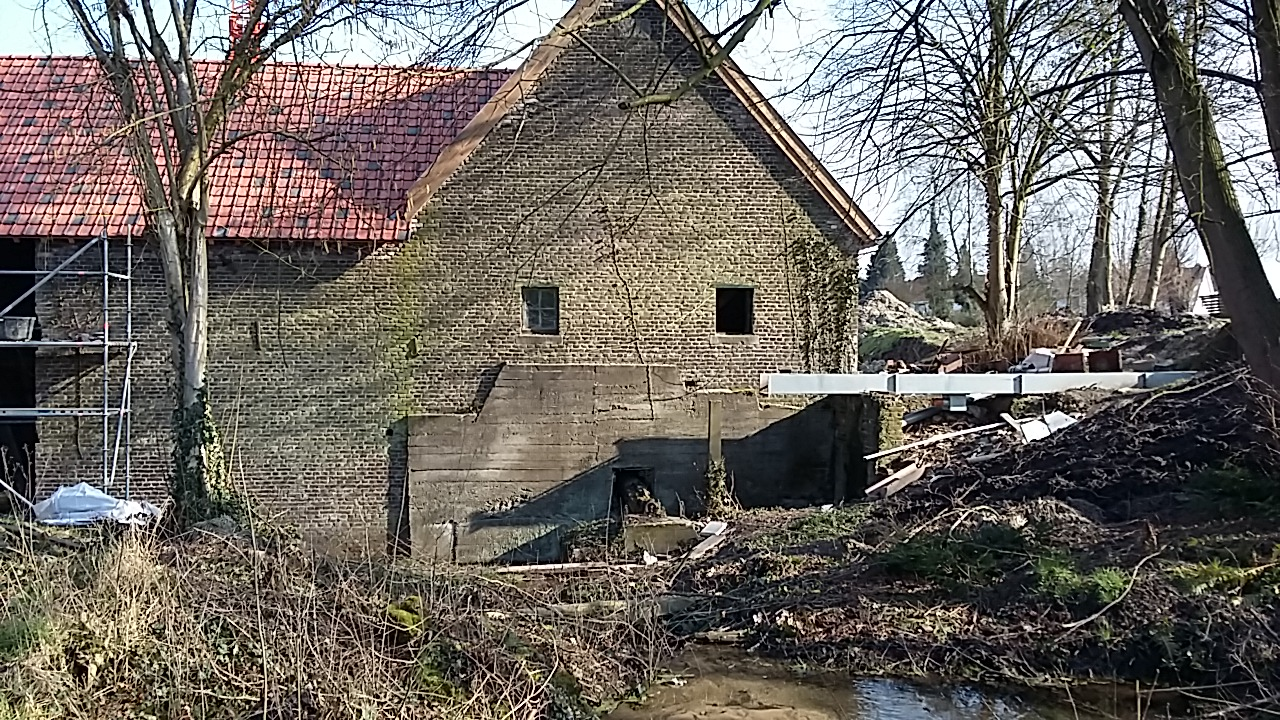 De Heidemolen in Lanaken tijdens opknapwerkzaamheden